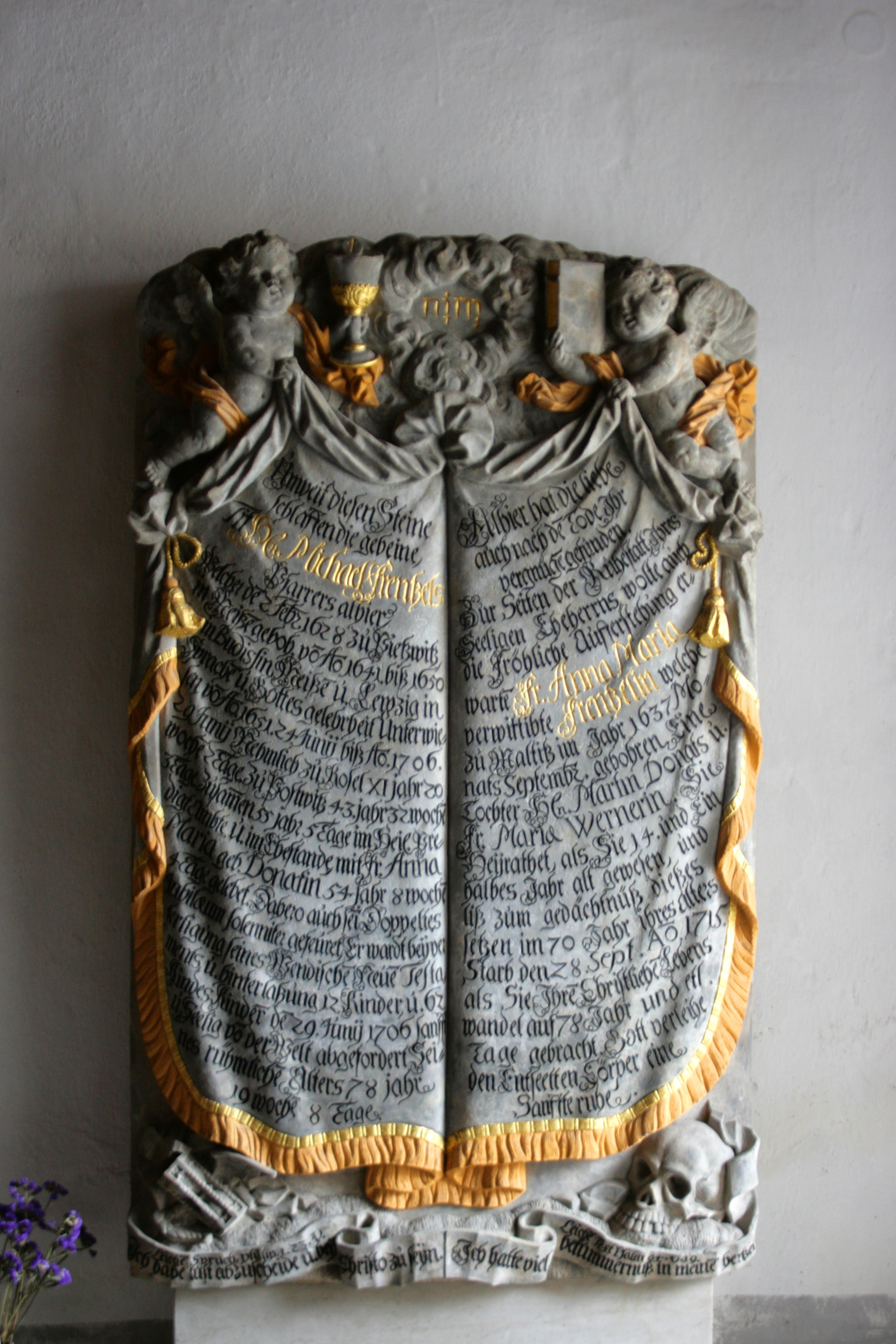 Grabstein von Pfarrer Michał Frencel (Michael Frenzel), Evangelische Kirche, Dorfstraße in Großpostwitz Hornjoserbsce: Narowny kamjeń fararja Michała Frencla w Budestečanskej cyrkwi.